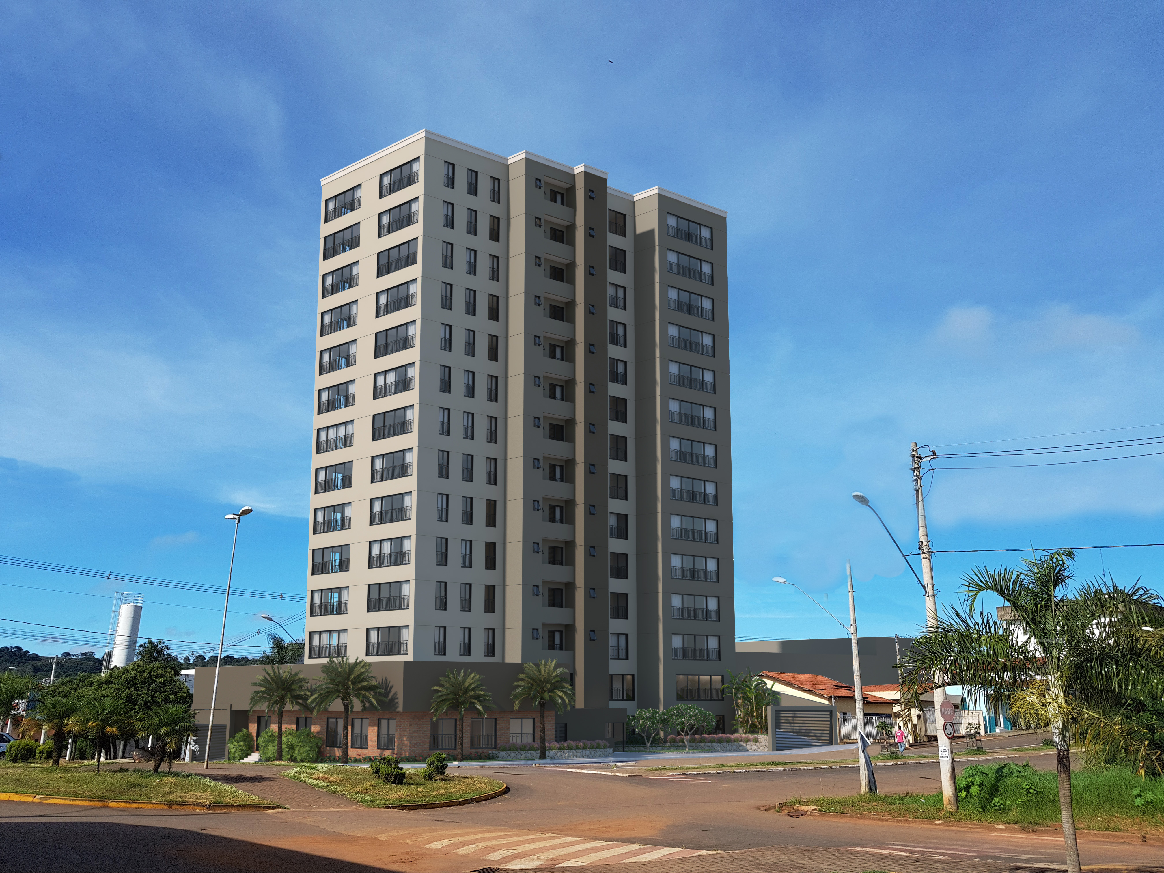 Investimento privado na construção de um dos maiores prédios do Brasil para cidades do porte de Perdizes.